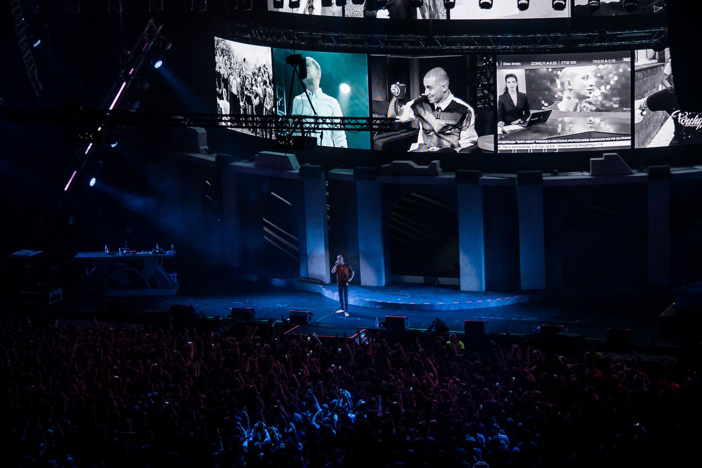 Выступление Oxxxymiron в Ледовом дворце Санкт-Петербурга 28 октября 2017 года